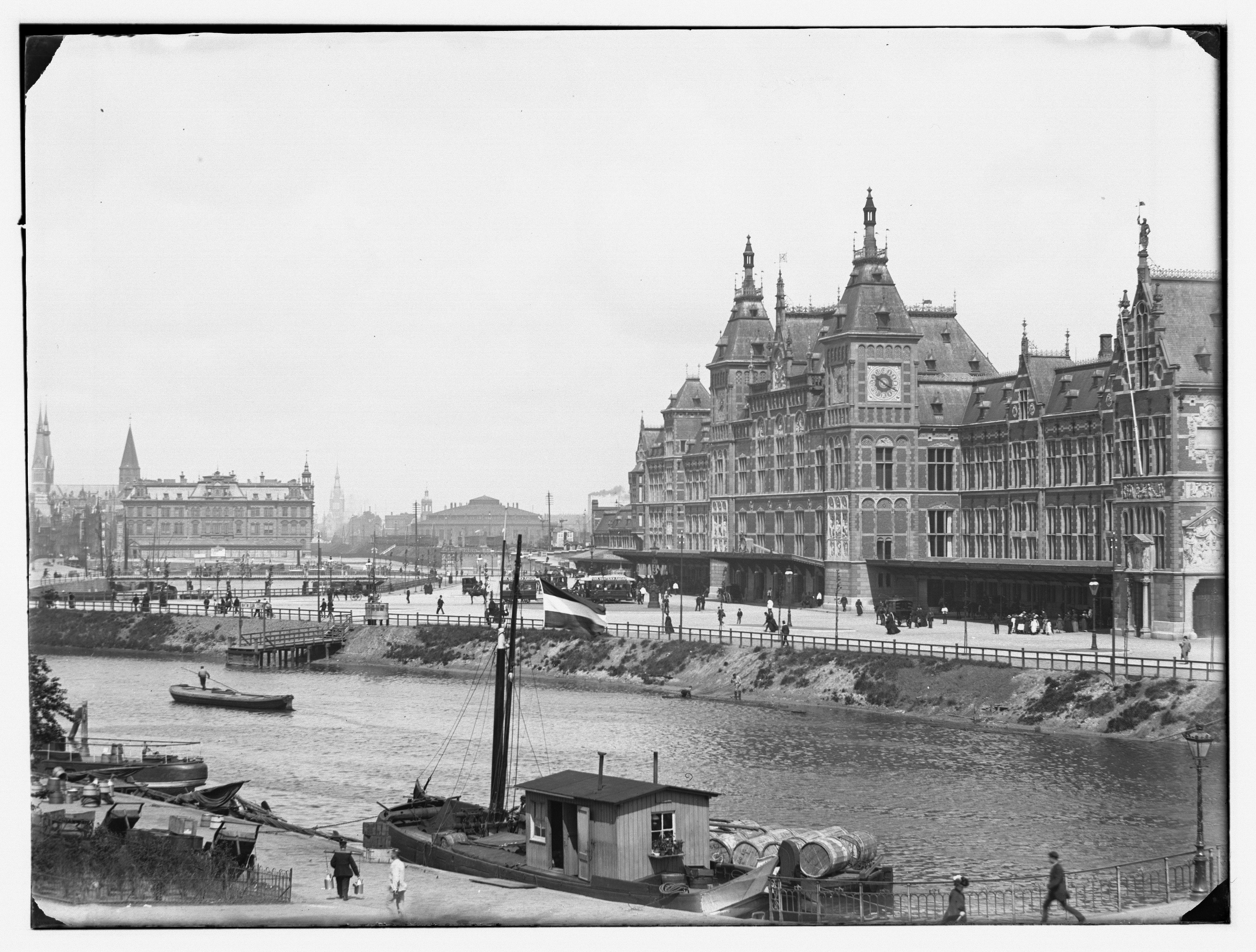 Beschrijving Open Havenfront Gezien naar Noord-Hollands Koffiehuis``, steiger NH-tram en Centraal Station. Op de voorgrond de Prins Hendrikkade bij Kamperbrug (nr.285) Documenttype foto Vervaardiger Olie``, Jacob (1834-1905) Collectie Collectie Jacob Olie Jbz. Datering 20 mei 1897 Geografische naam Open Havenfront Inventarissen Afbeeldingsbestand 10019A000331 Generated with Dememorixer